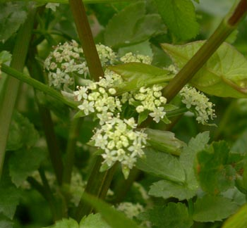 Helosciadium nodiflorum, closeup Source : [1]